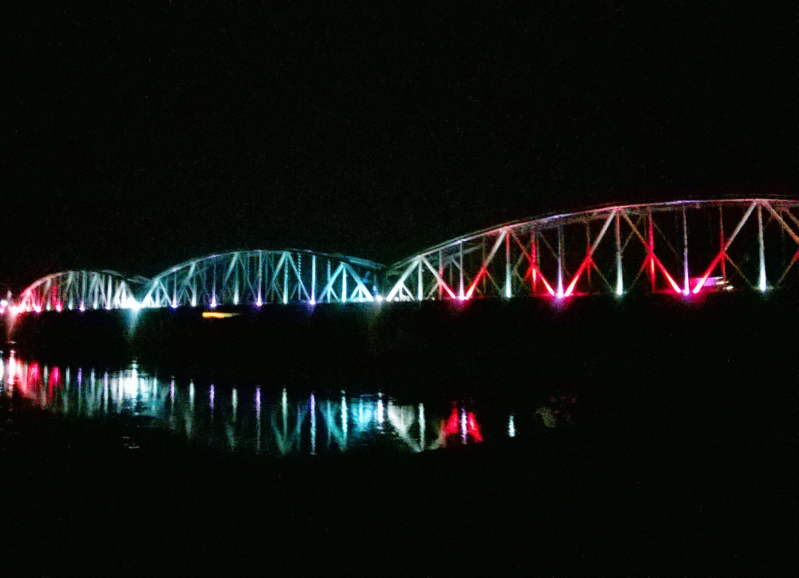 Bella Skyway Festival w Toruniu 2019